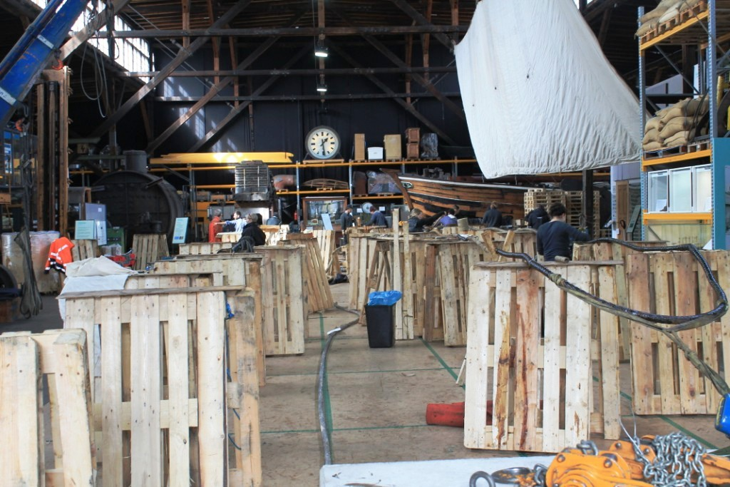 Takelarbeiten im Hafenmuseum für die Peking